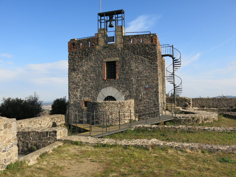 Castell de Torcafelló a Maçanet de la Selva - Catalunya